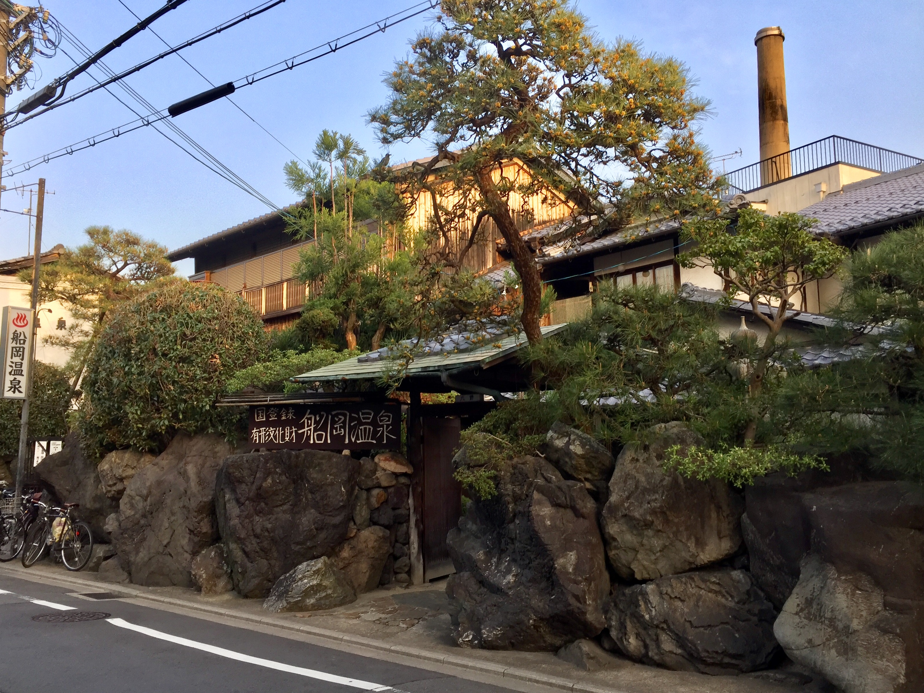 船岡温泉の建物（左が銭湯・脱衣場の建物、右手前が料理旅館であった旧船岡楼の建物）。「国登録有形文化財 船岡温泉」と書かれた板が掲げられている。